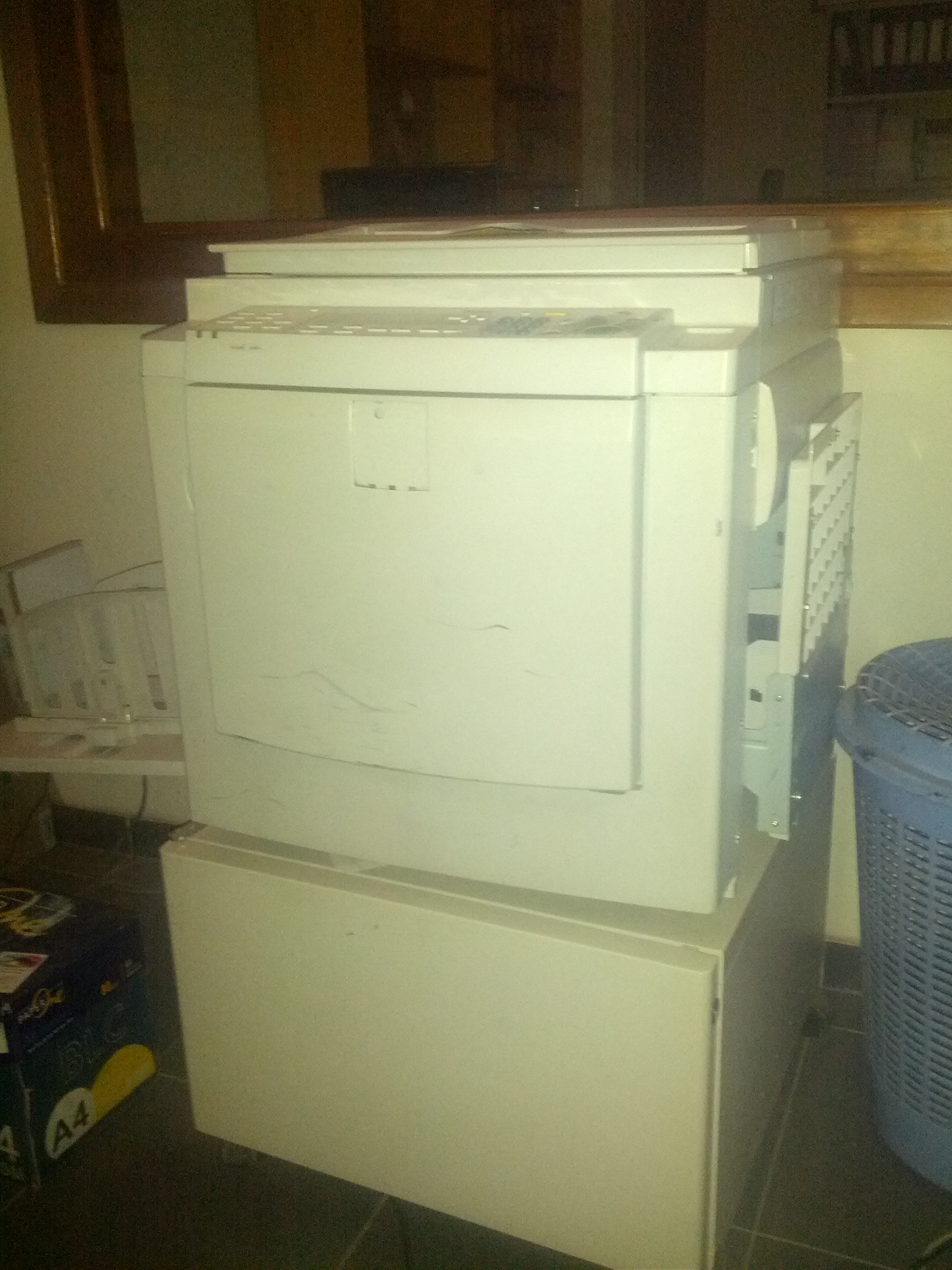 Machine imprimente professionnel du CEDESURK, l'unité de réproduction du CEDESURK et sa machine de production des documents scientifiques des établissements universitaire de Kinshasa